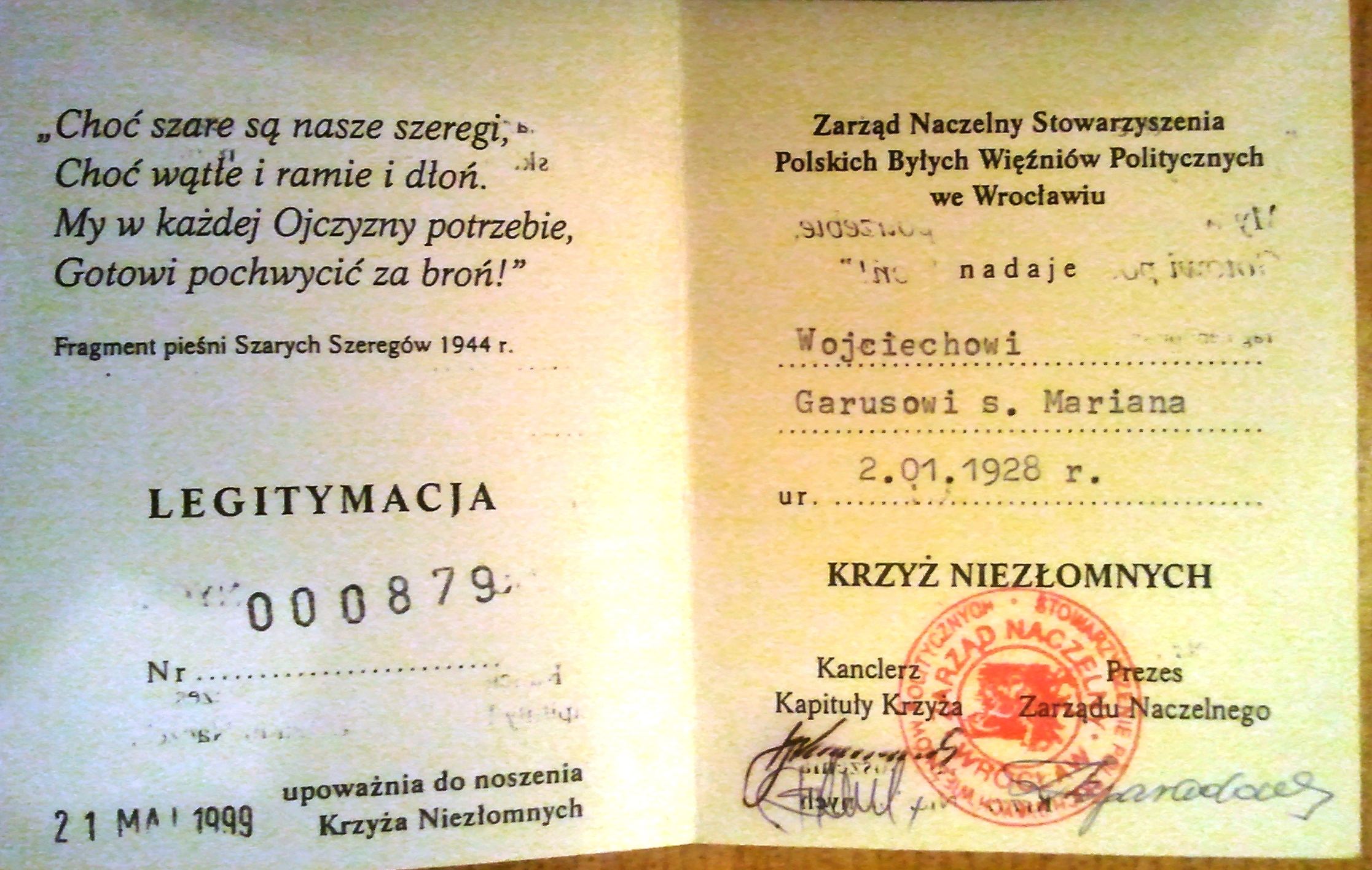 Legitymacja z odznaczenia Wojciecha Garusa Krzyżem Niezłomnych